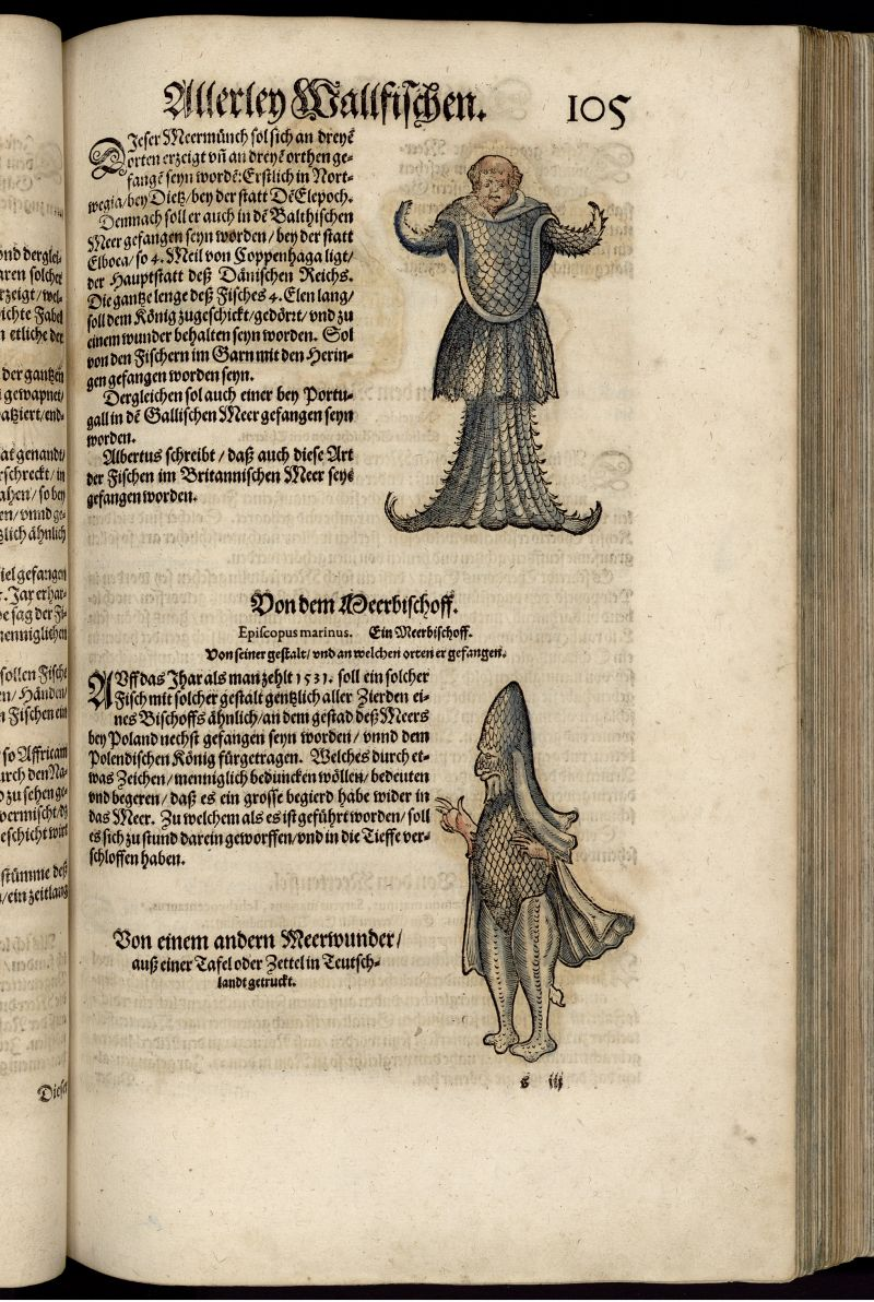 Buchseite aus Konrad Gesner: Fischbuch, Der zwölffte theil von de Meertheire. So begreifft allerley grosse Wallfisch, Meerwunder und Schiltkrotten, S. 105 v (Abb. Meermünch und Meerbischoff)